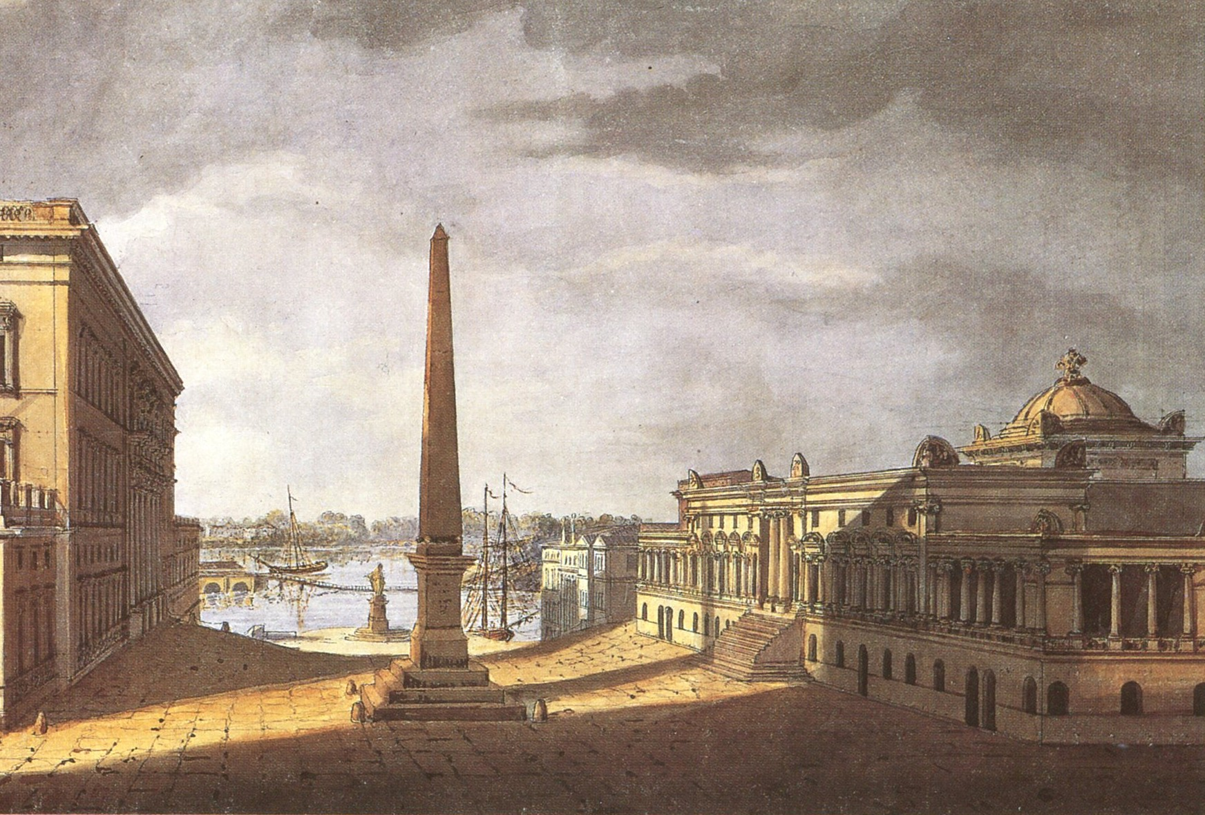 Förslag för Nationalmuseum på Slottsbacken